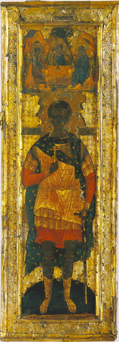 Великомученик Димитрий Солунский. "Родимая" икона царевича Дмитрия Ивановича. Икона в окладе. Размеры: 48,0 х 16,5 х 2,5 см Москва, 1582 г. Дерево, левкас, серебро, темпера, золочение, басма. Происходит из Архангельского собора Московского Кремля. ММК. Ж-525/1 Мерная икона младшего сына Ивана Грозного, царевича Димитрия Угличского (1582-1591), выполнена в 1582 году. Святой Димитрий-воин представлен фронтально в рост. В правой руке он держит крест, а в левой опирается на изящный меч в ножнах. Димитрий облачен в короткую красную тунику и пластинчатый доспех, поверх которого надета короткая золотистая туника. Складки туники и пластины доспеха моделированы при помощи ассиста. Темный сине-зеленый плащ с редко расположенным золотым орнаментом завязан на левом плече узлом.